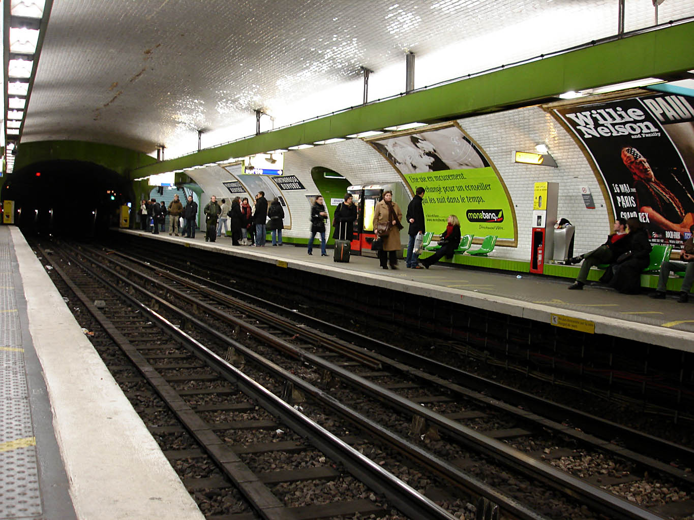 Métro de Paris (France) - ligne 13 - Station Montparnasse - Bienvenüe